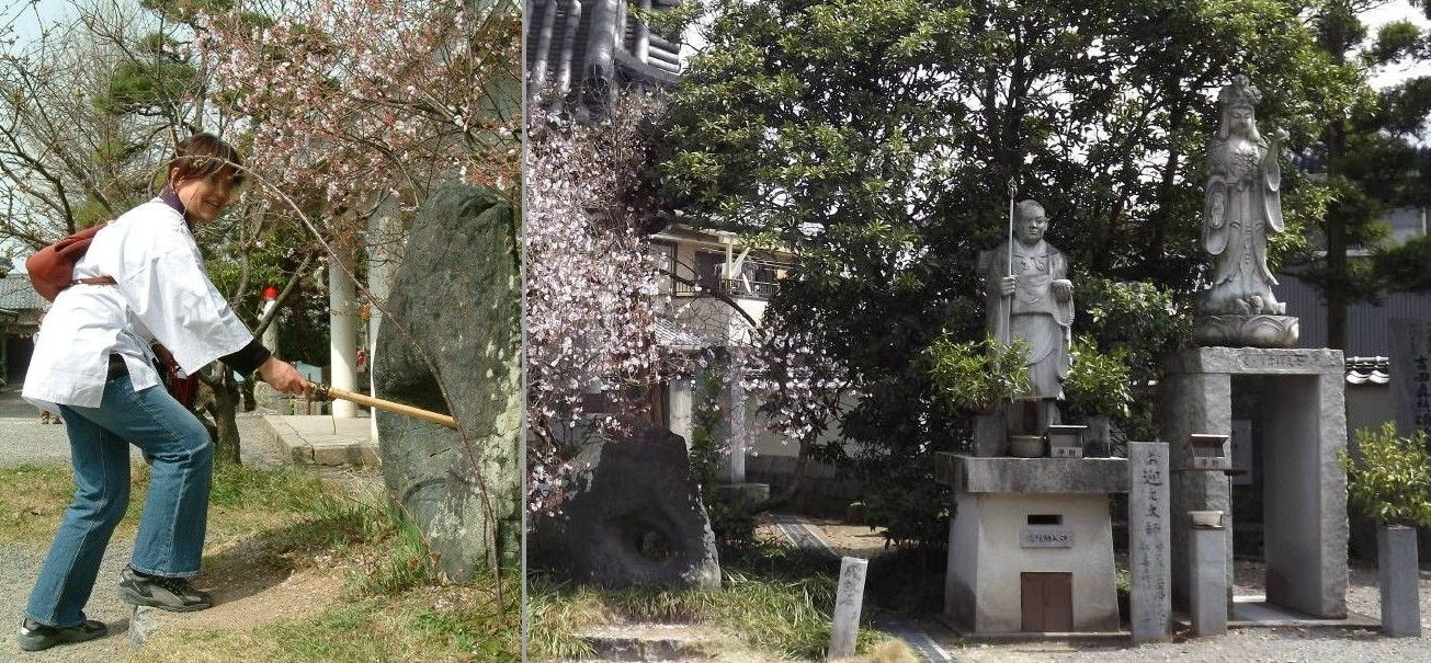 吉祥寺の成就石